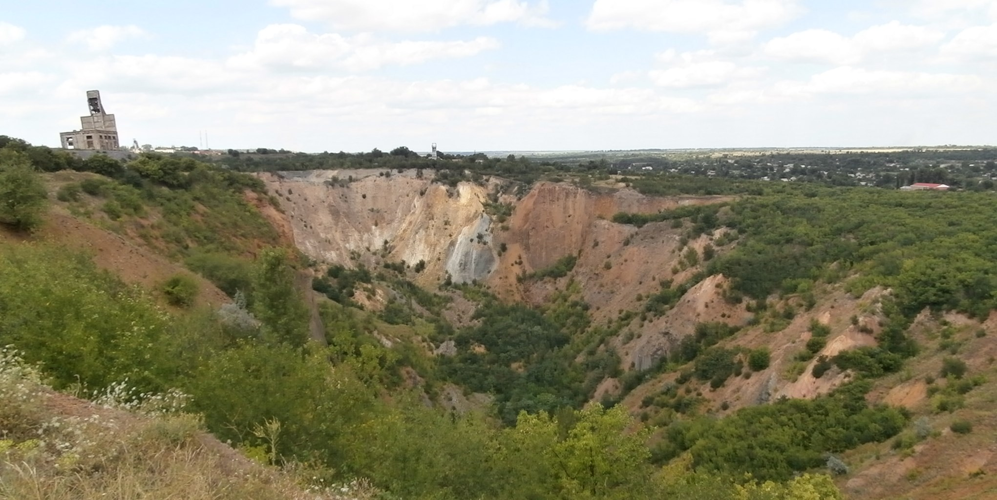 Schowti Wody Alte Erzgrube